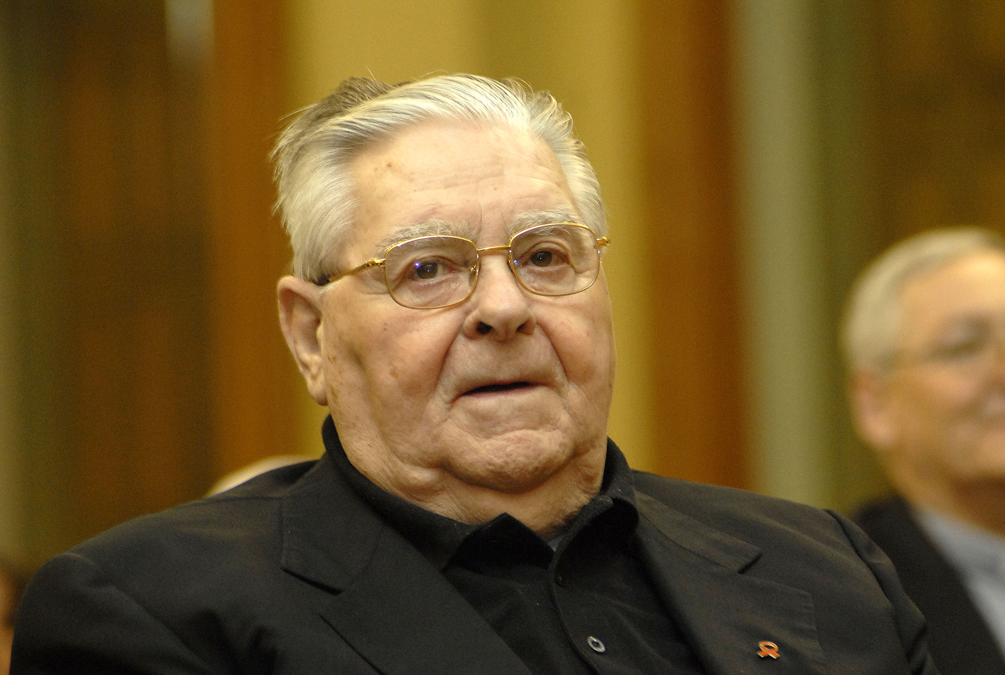 La UC rindió un homenaje al padre Baldo Santi por su labor con los enfermos de Sida.jpg. La figura del Padre Baldo Santi encarna la labor que la Iglesia Católica puede desarrollar en la lucha contra en VIH Sida y en el apoyo a los enfermos y sus familias. Por eso, el sacerdote fundador de la Clínica-Familia recibió el lunes 22 un homenaje durante la Jornada de Reflexión, convocada por la Pontificia Universidad Católica de Chile y la Organización Panamericana de la Salud (OPS).